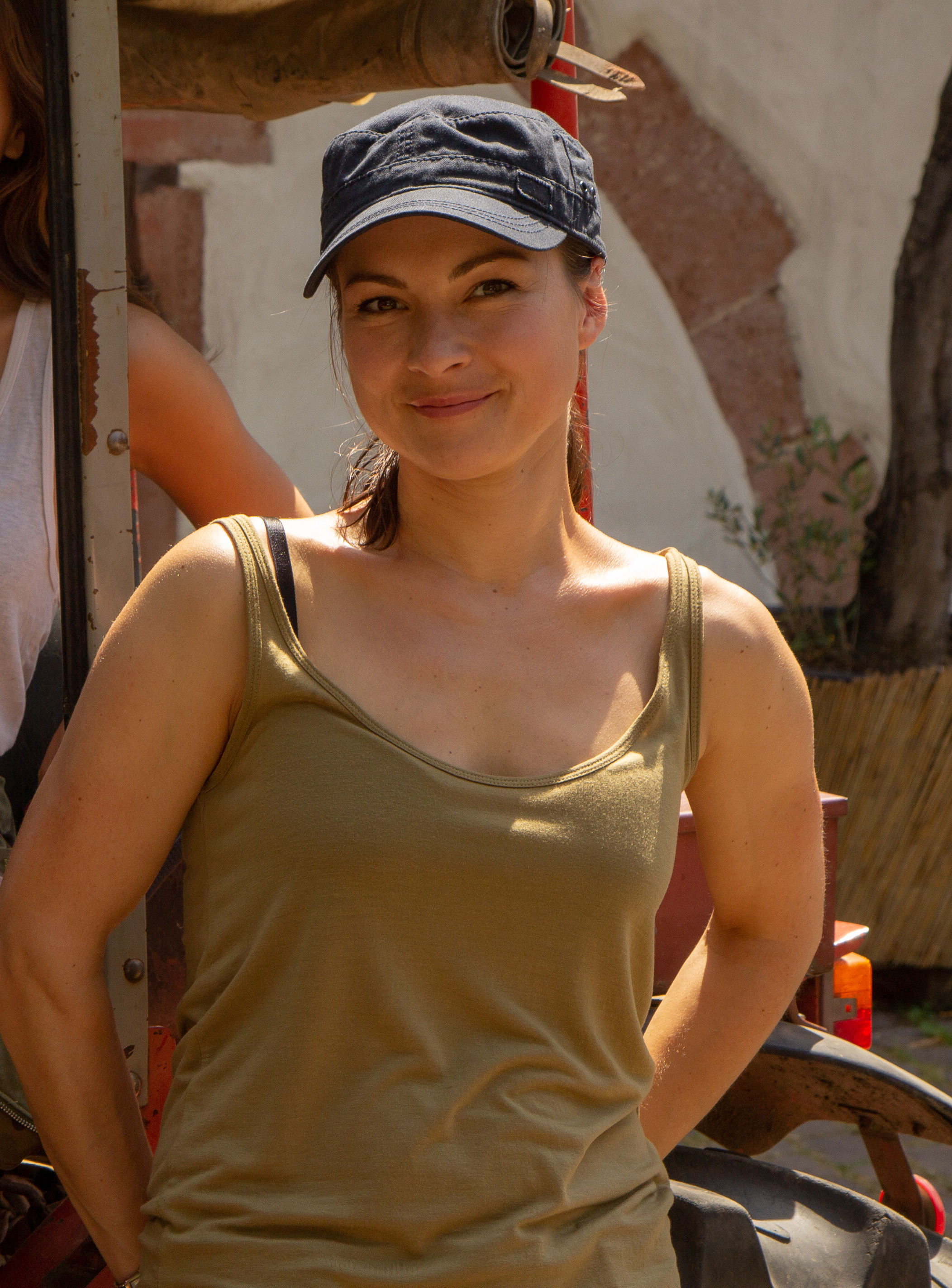 Foto- und Interviewtermin am Set von „Weingut Wader - Das Familiengeheimnis".